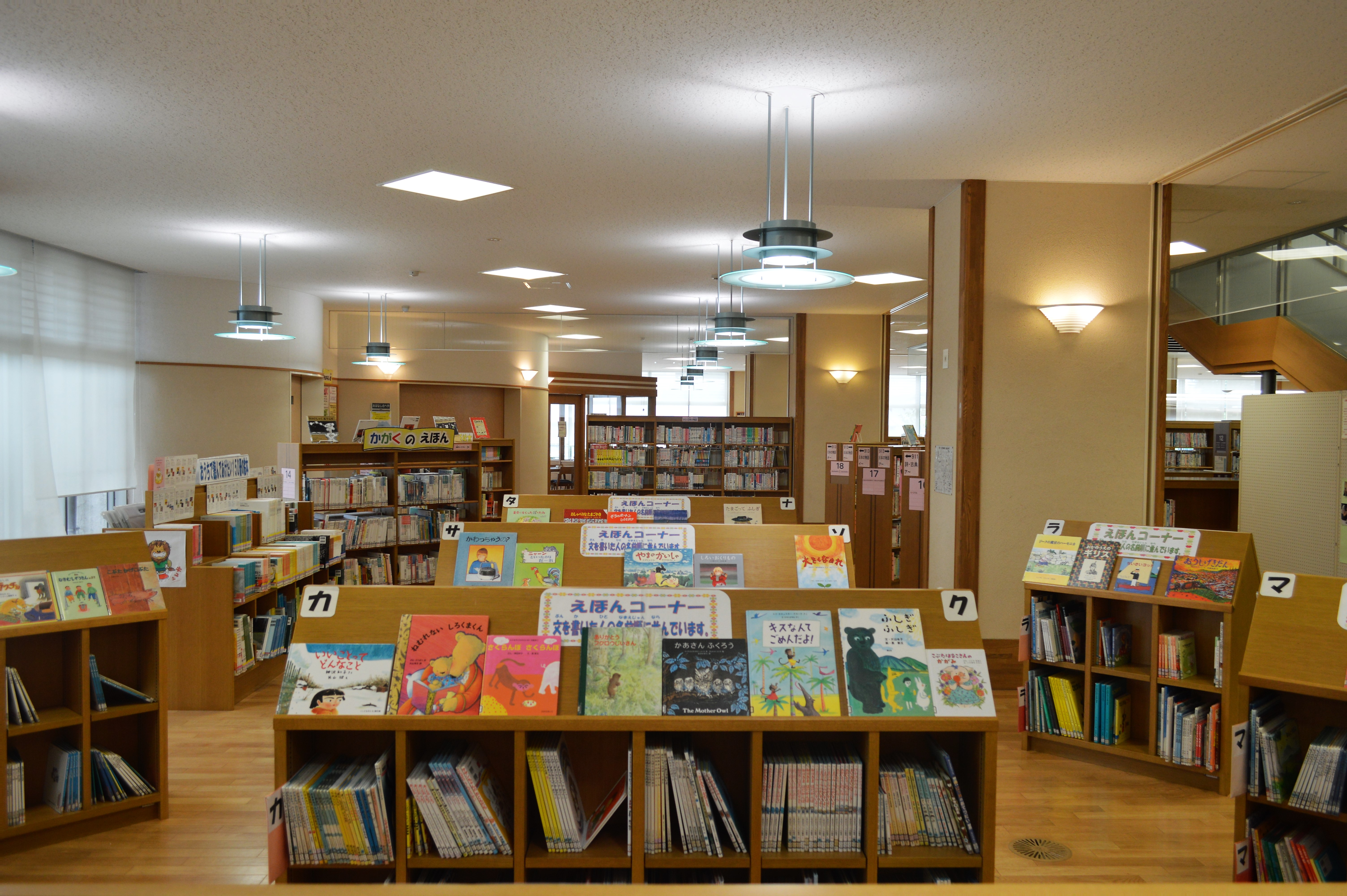 浜松市立城北図書館。児童開架。